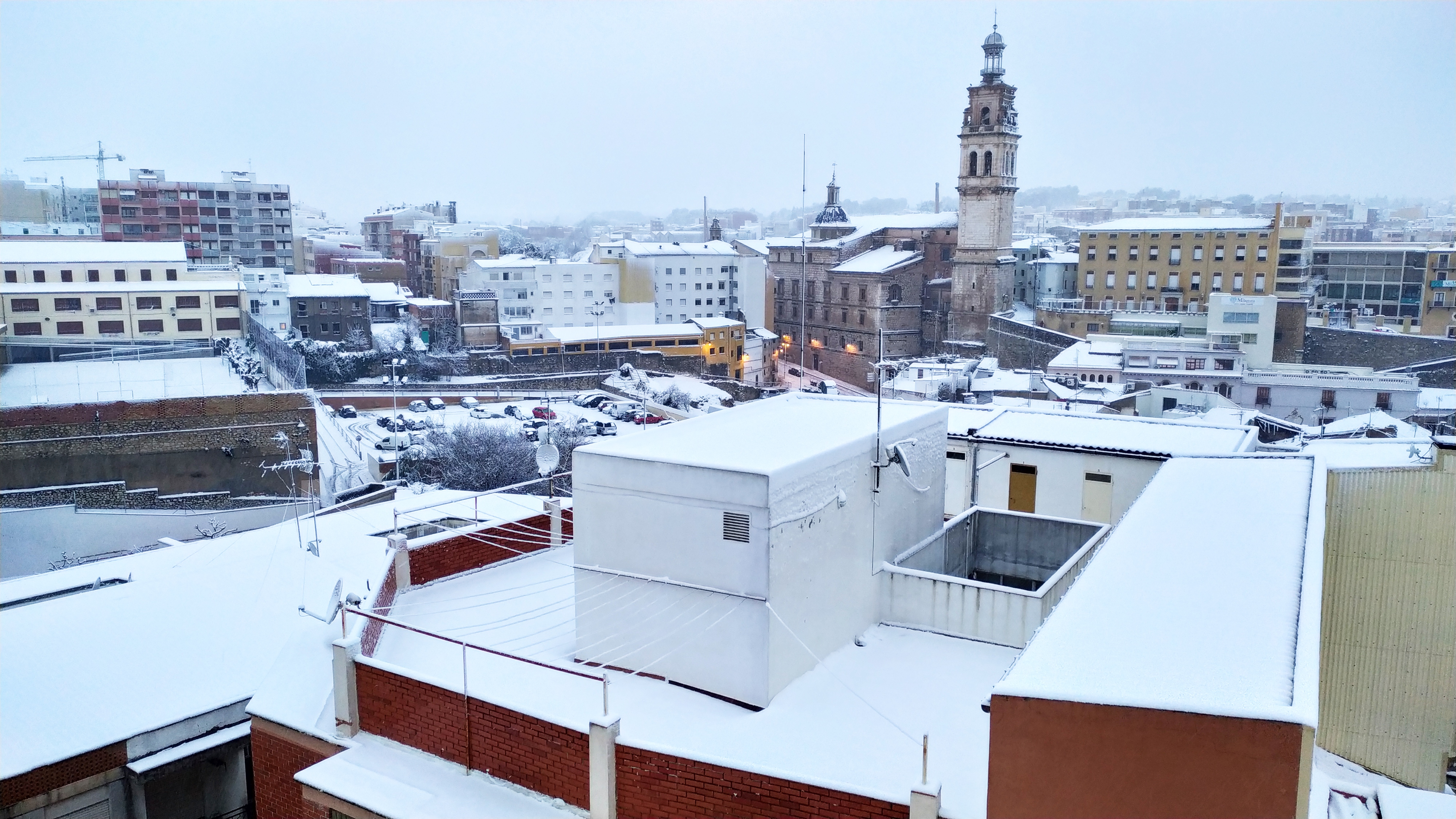 Nevada de 2019